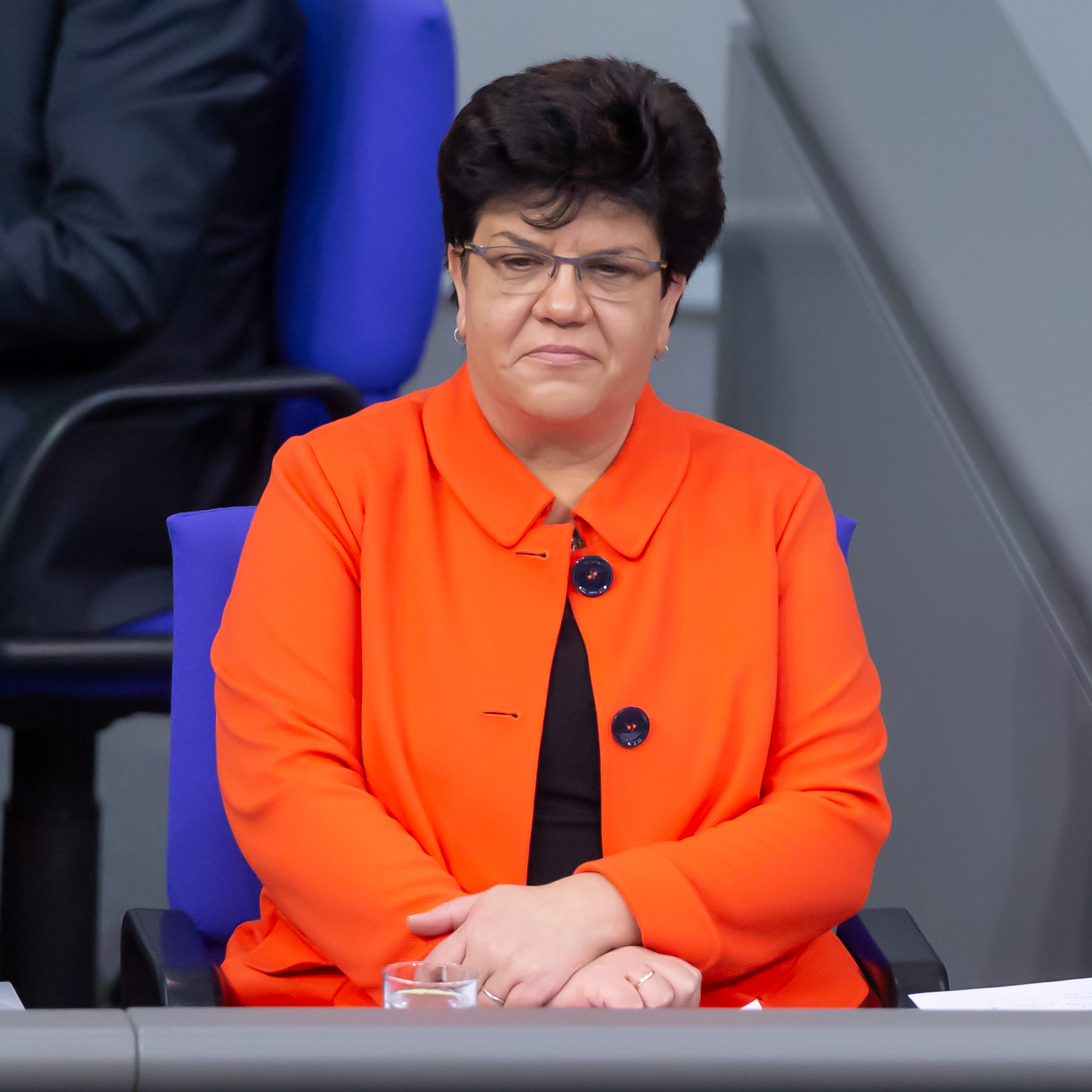 Deutscher Bundestag; Claudia Moll, SPD, als Schriftführerin des 19. Deutschen Bundestages